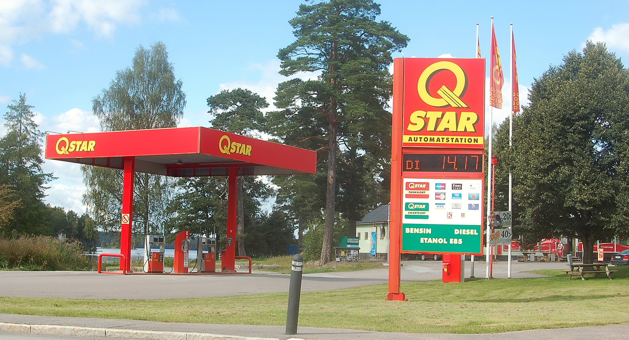 Q-Stars bränsledepå i Svartå